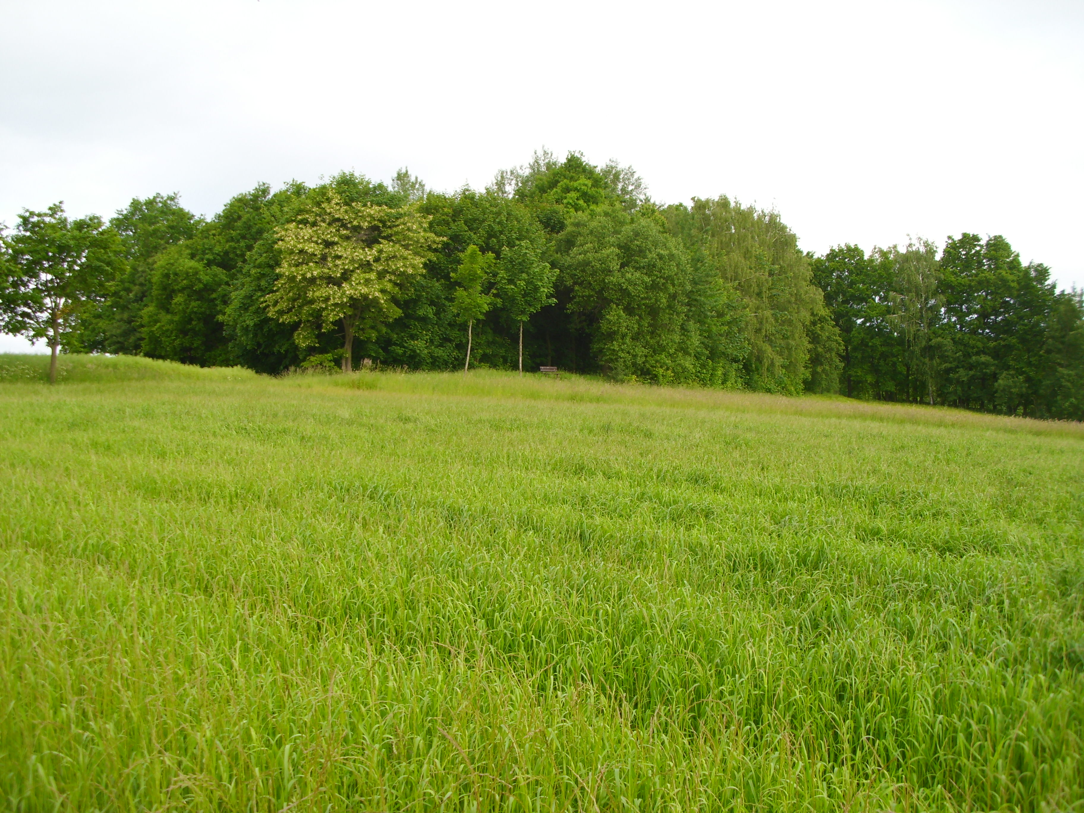 Der Götzenbusch, Ansicht vom Großoelsaer Feld beim Fahrradweg.